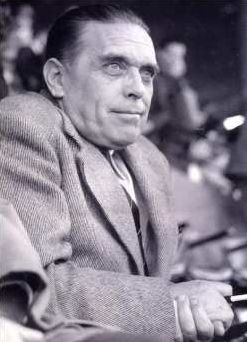 Paul nicolas regardant jouant son équipe (1957)